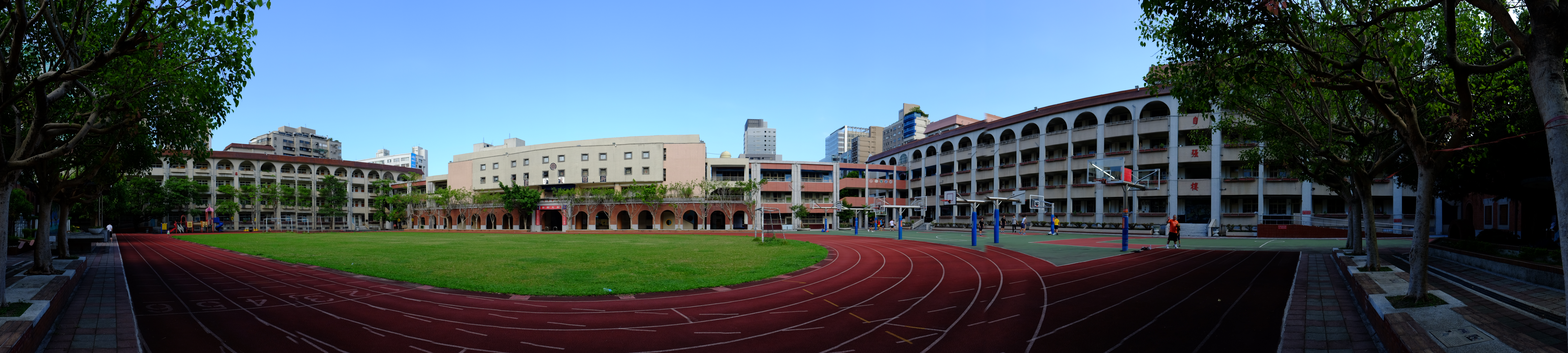 臺北市大同區日新國民小學 Taipei Municipal Rixin Elementary School